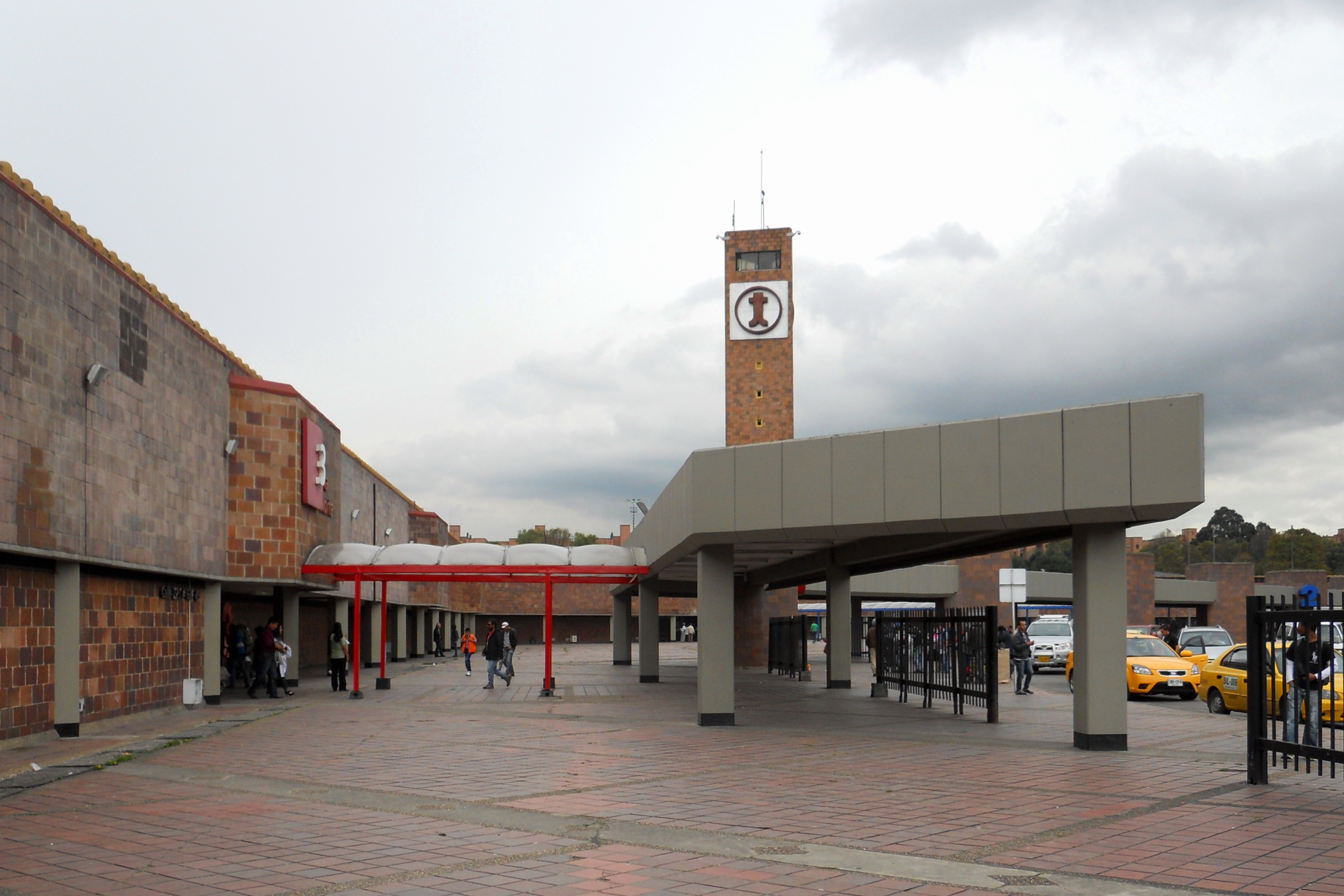 Entrada tres (roja) de la Terminal de Transportes de Bogotá.